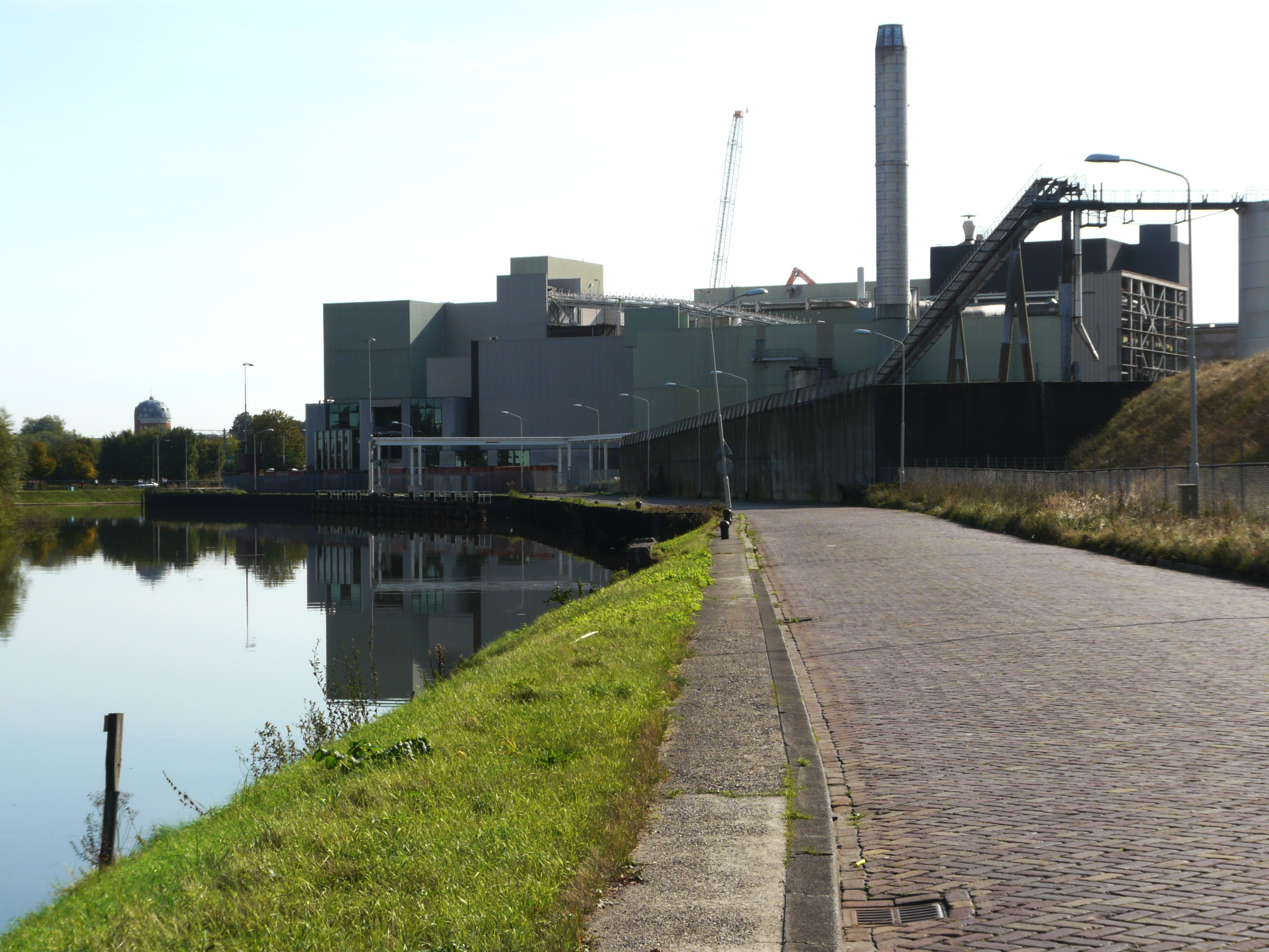 Zicht op deel van de straat de Markkade, Breda en de rivier de Mark ter hoogte van de voormalige suikerfabriek van de CSM Breda